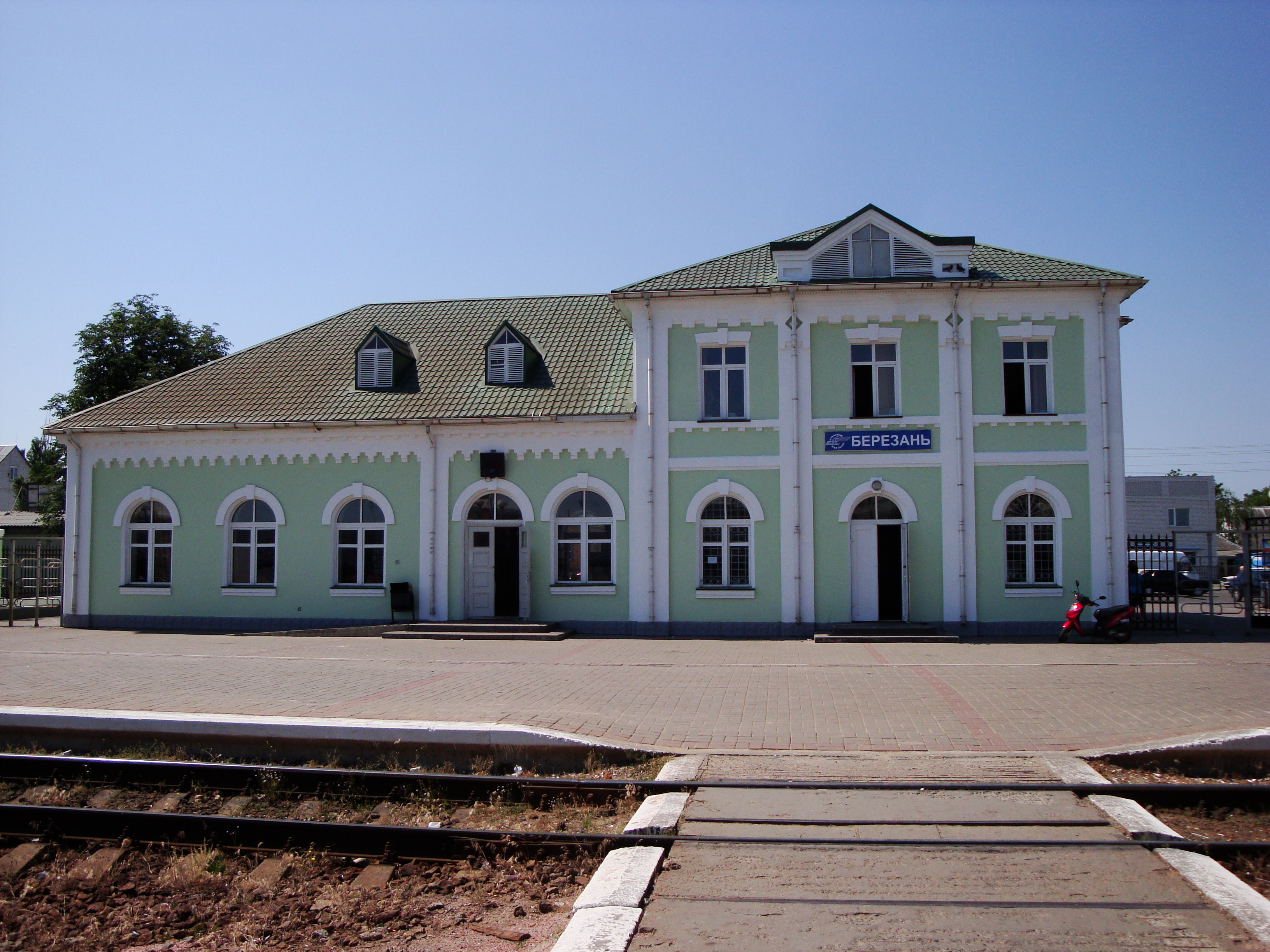 Вокзал ст. Березань